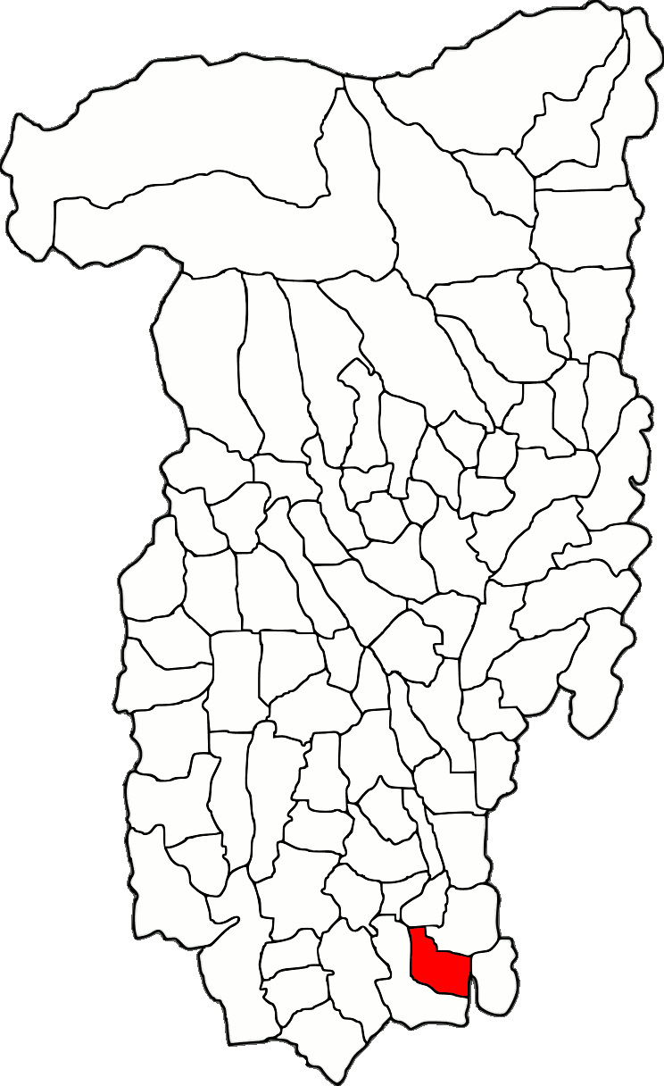 Lage der Gemeinde Ștefănești im Kreis Vâlcea (RO).